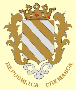 Escudo de la República Cremasca